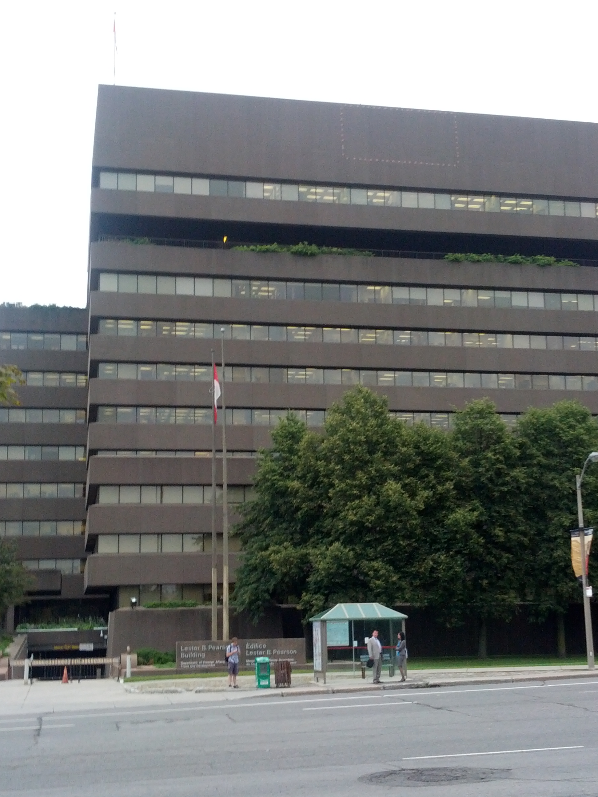 Edificação em Ottawa.